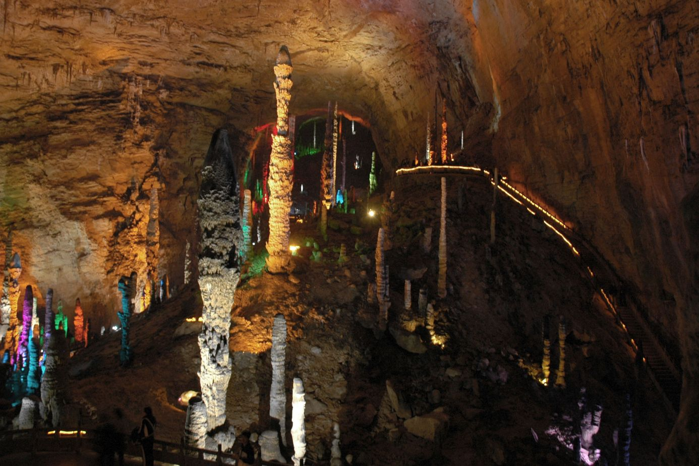 湖南张家界黄龙洞